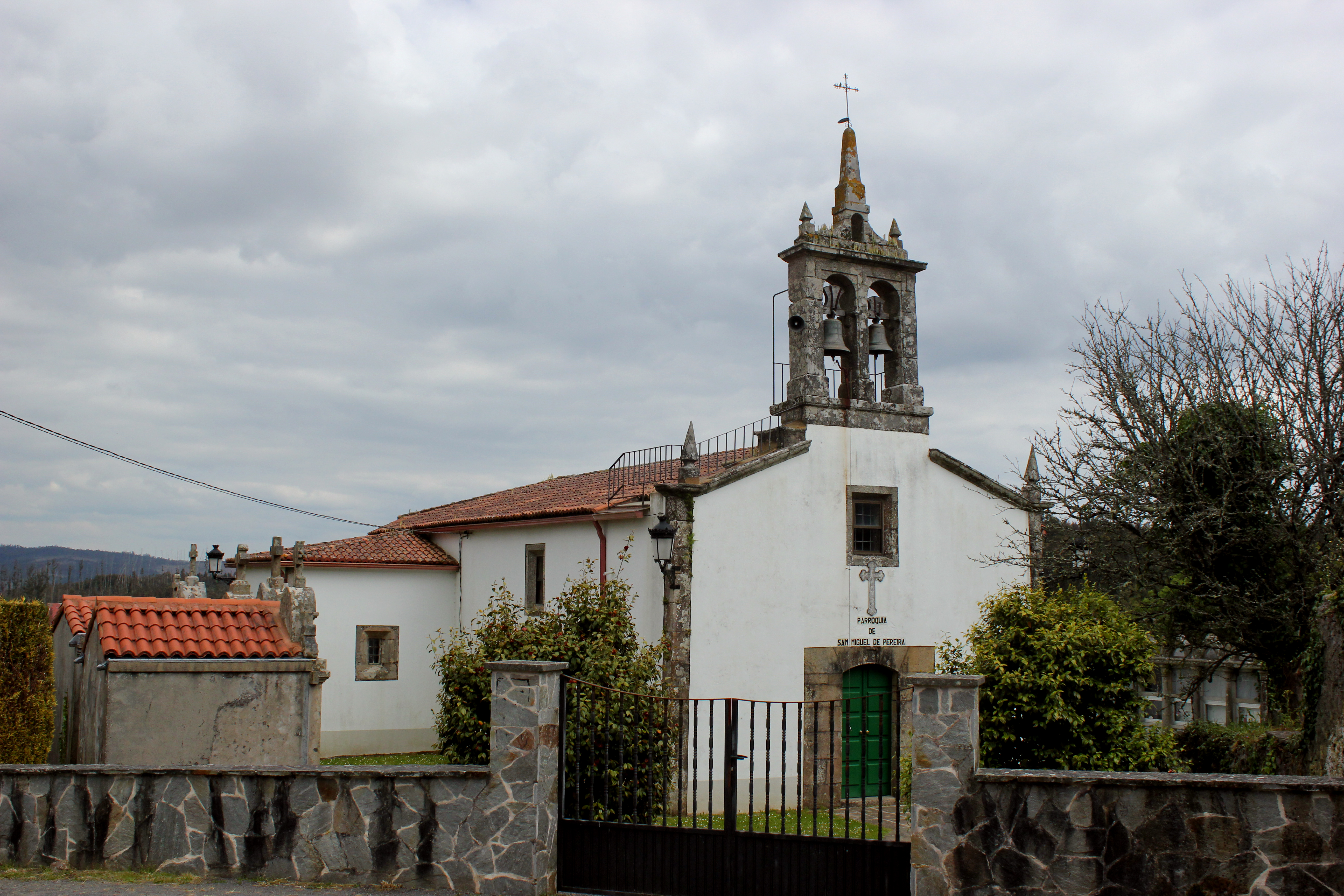 Igrexa de Pereira, O Pino.